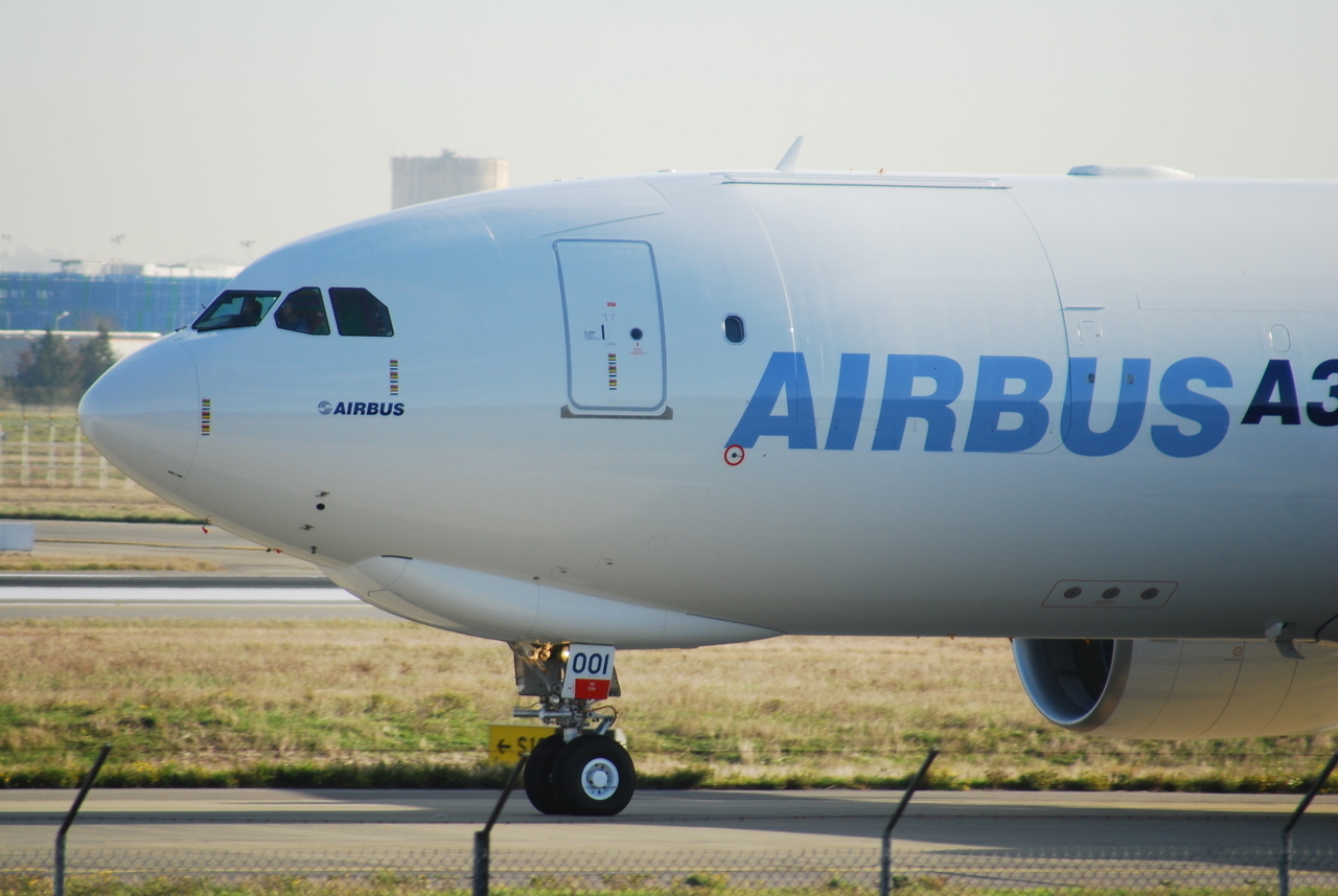 Photo prise à l'aéroport de Toulouse-Blagnac (LFBO) en France. Picture take at Toulouse-Blagnac Airport (LFBO) in France.